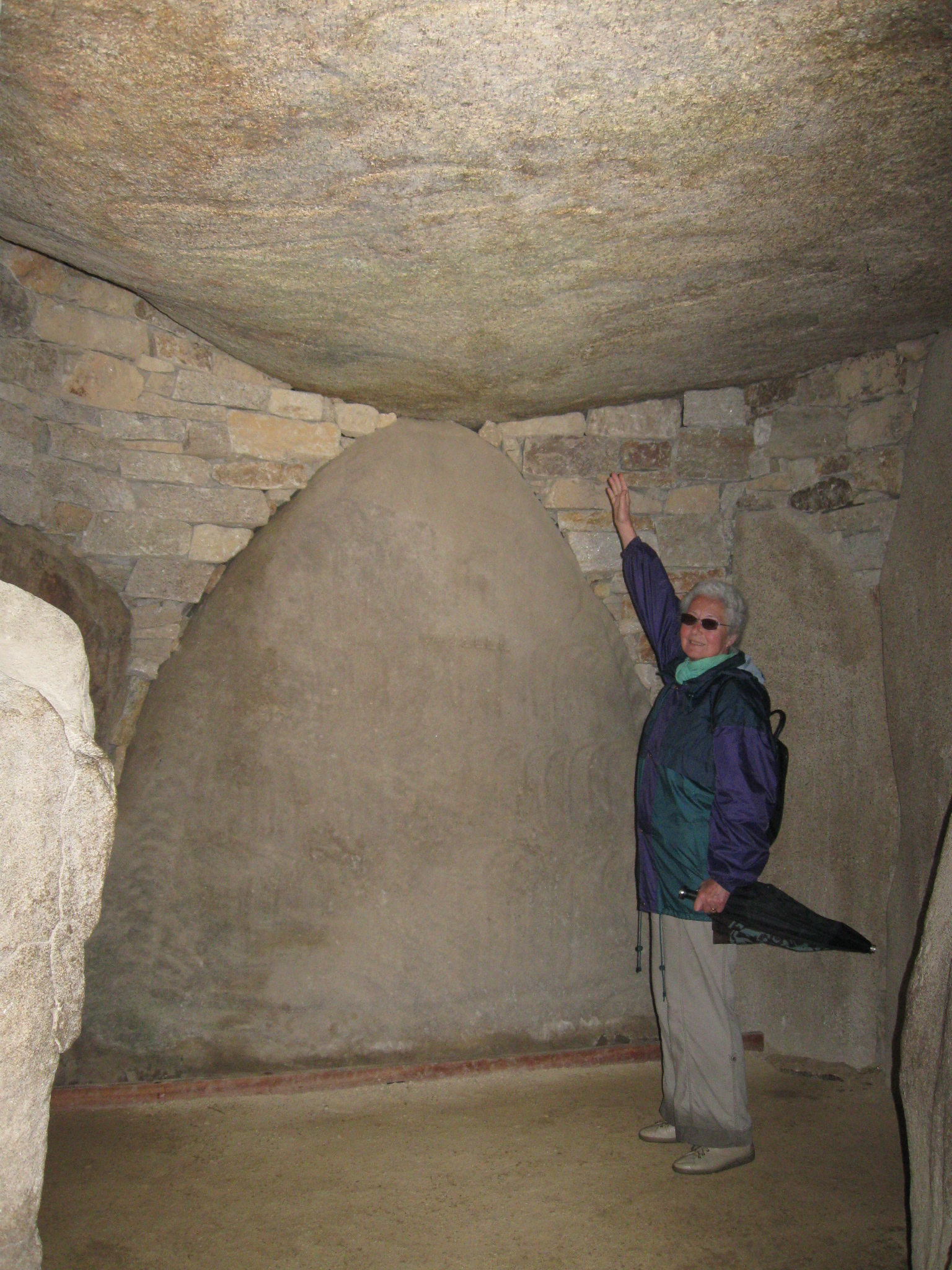 Cairn Table des Marchand, Grabkammer